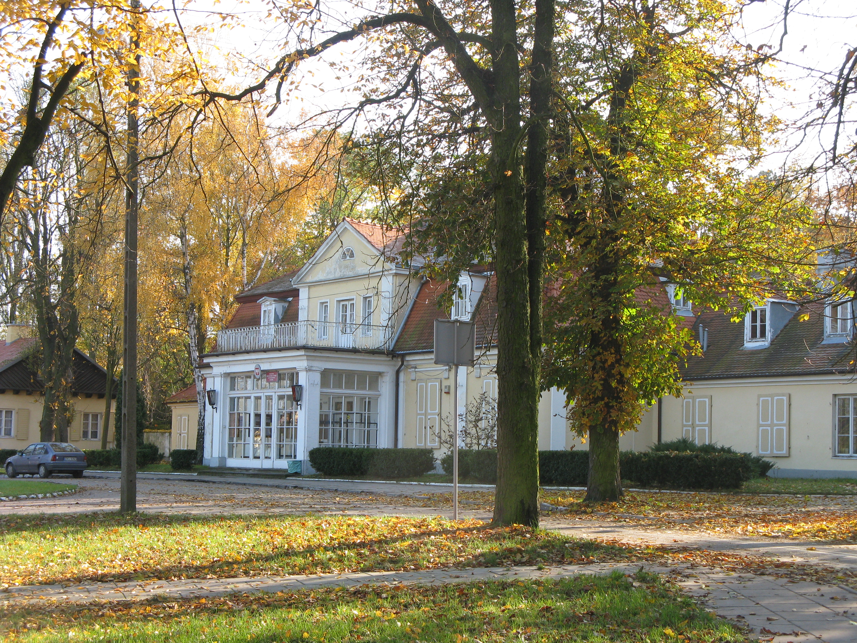 Zespół Pałacowy Gierałty, obecnie Szkoła Muzyczna w Kutnie 03.1947; 260/19 from 01.06.1967.